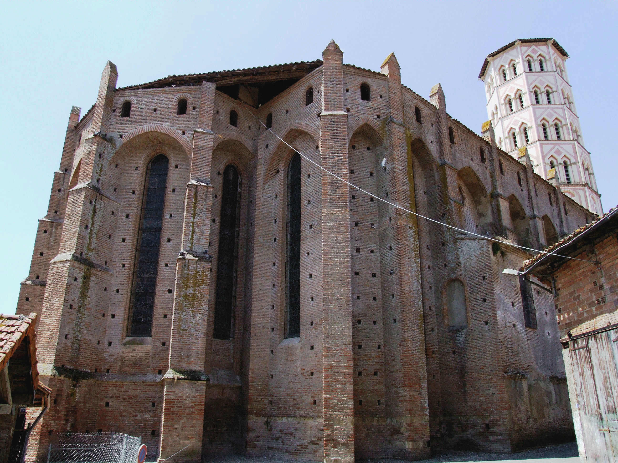 Cathédrale Sainte Marie de Lombez - Chevet